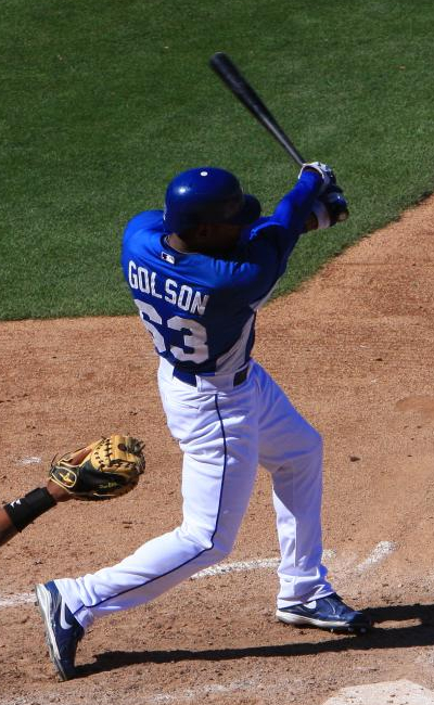 Greg Golson